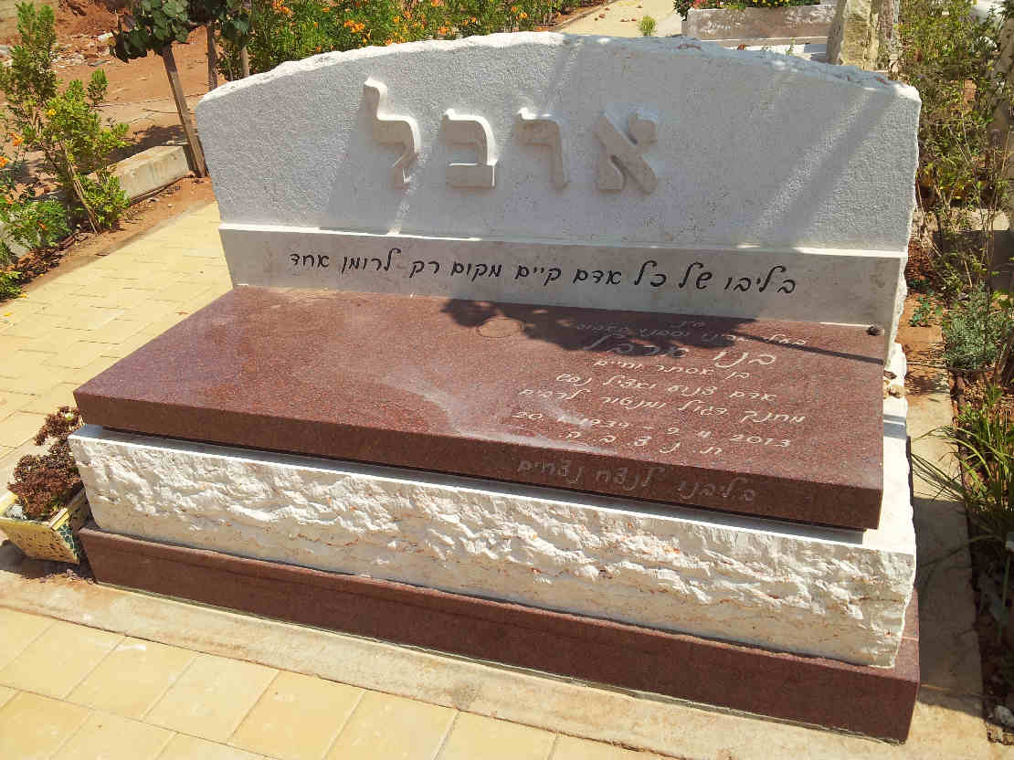 המצבה על קברו של פרופ' בנו ארבל